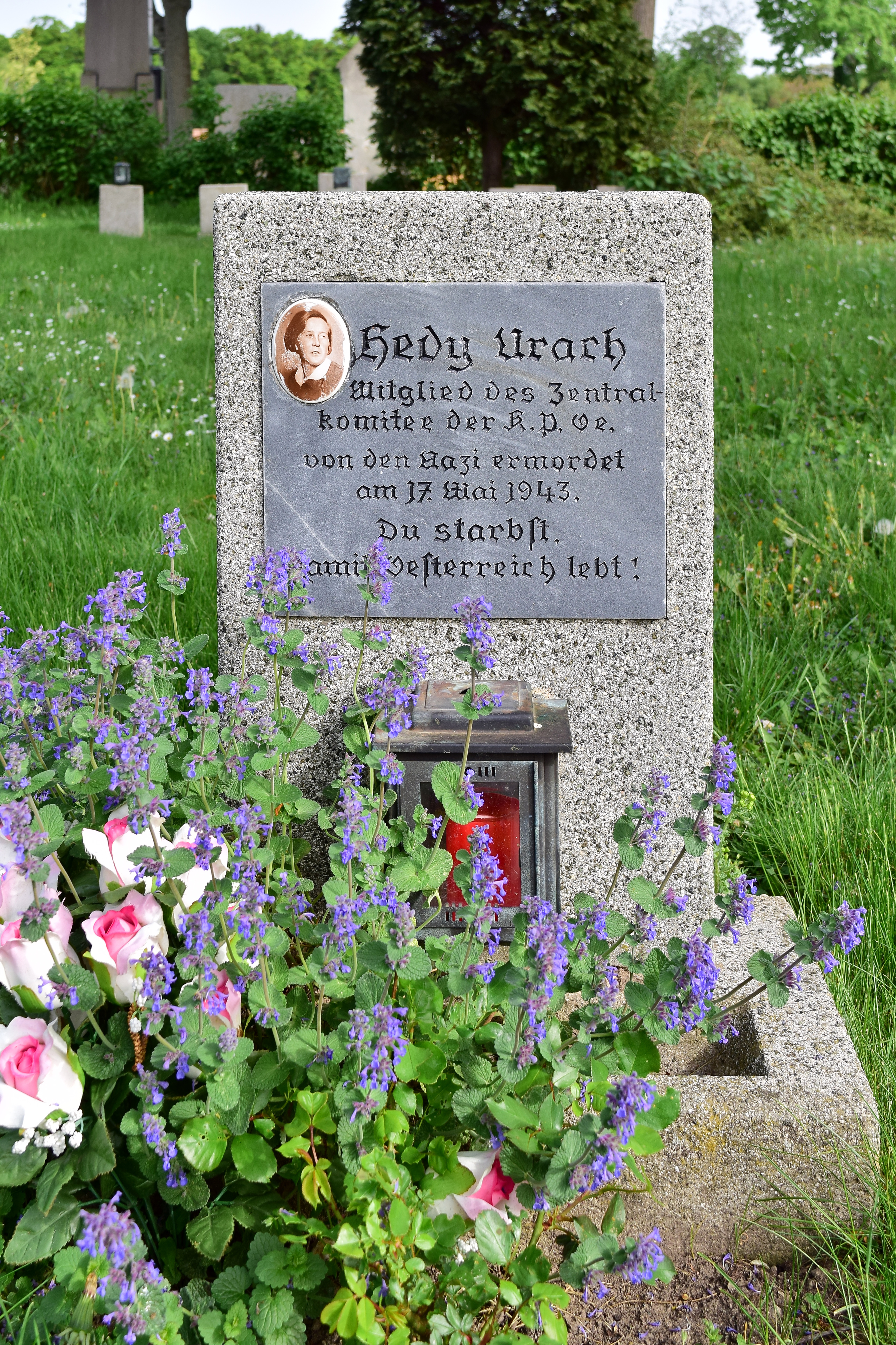 Bestattungs- und Gedenkstätte für die Opfer der NS-Justiz auf dem Wiener Zentralfriedhof